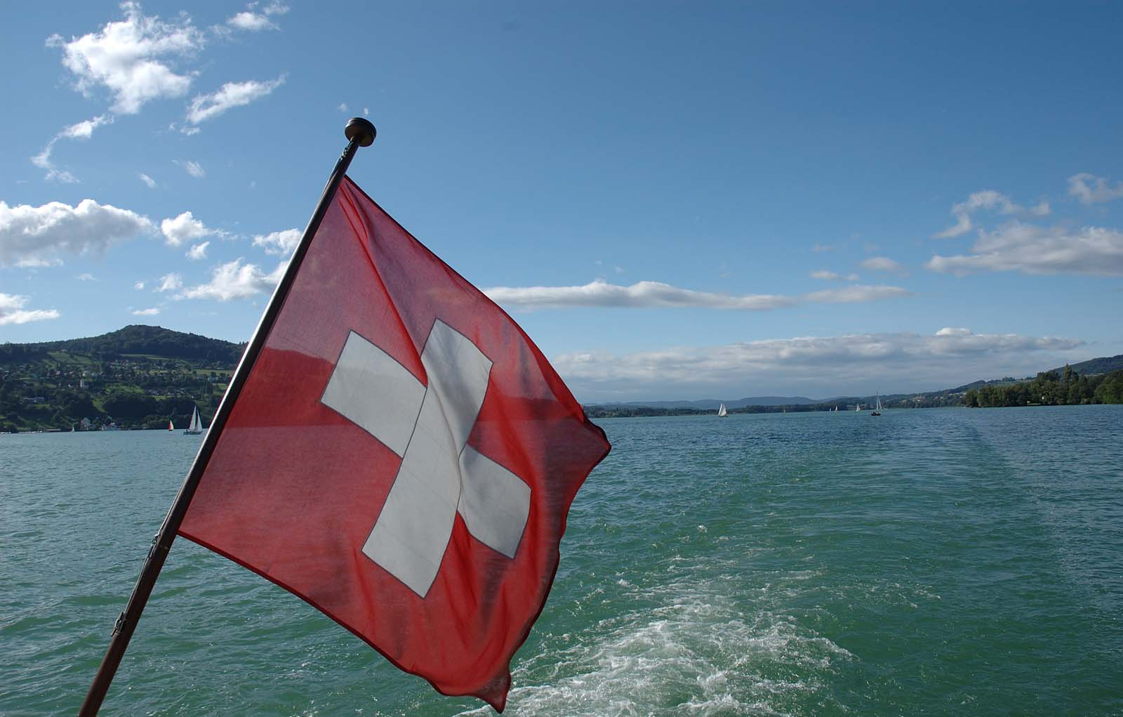 Hallwilersee vom Schiff aus gesehen